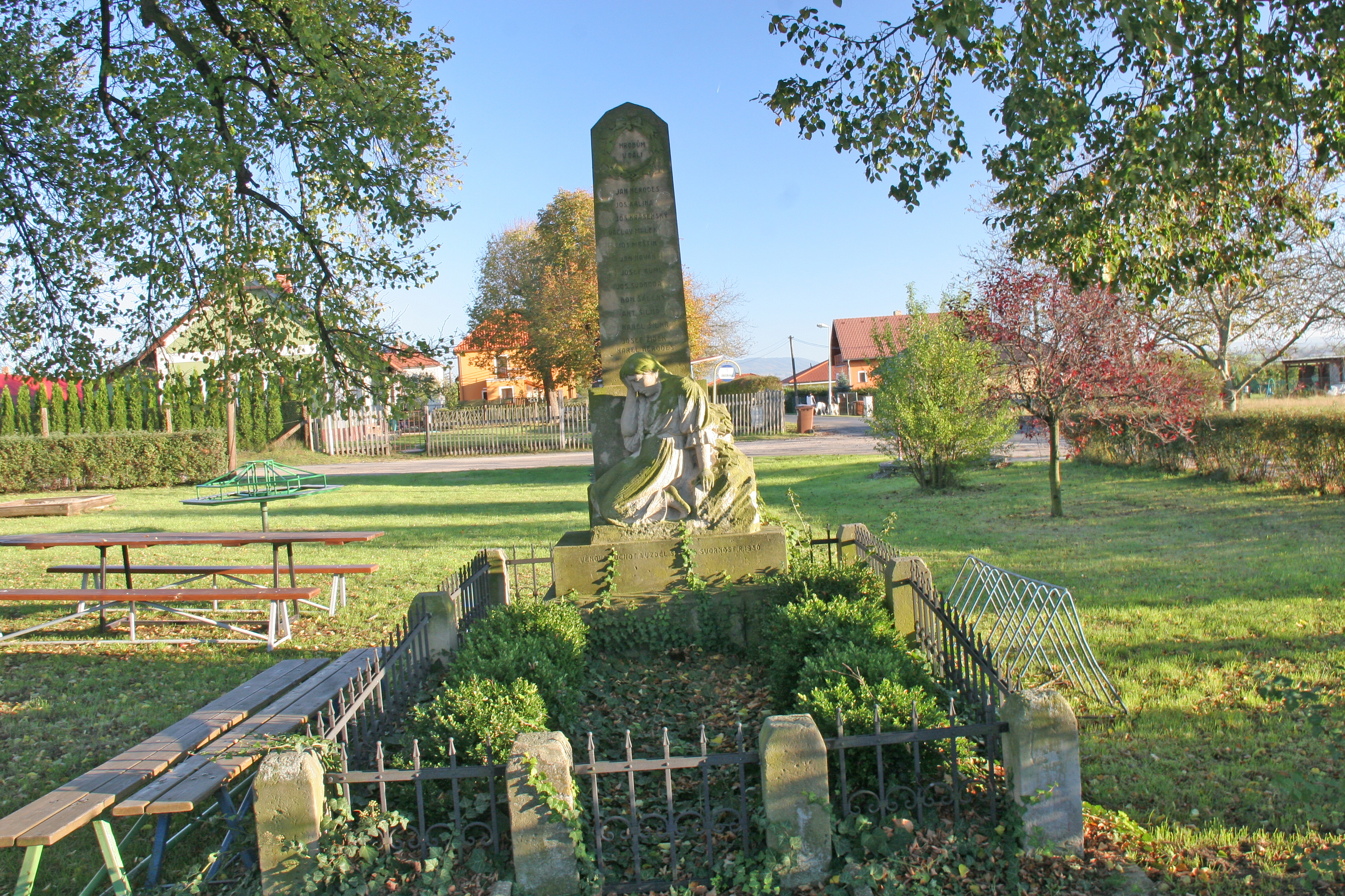 Svobodná Ves pomník padlých